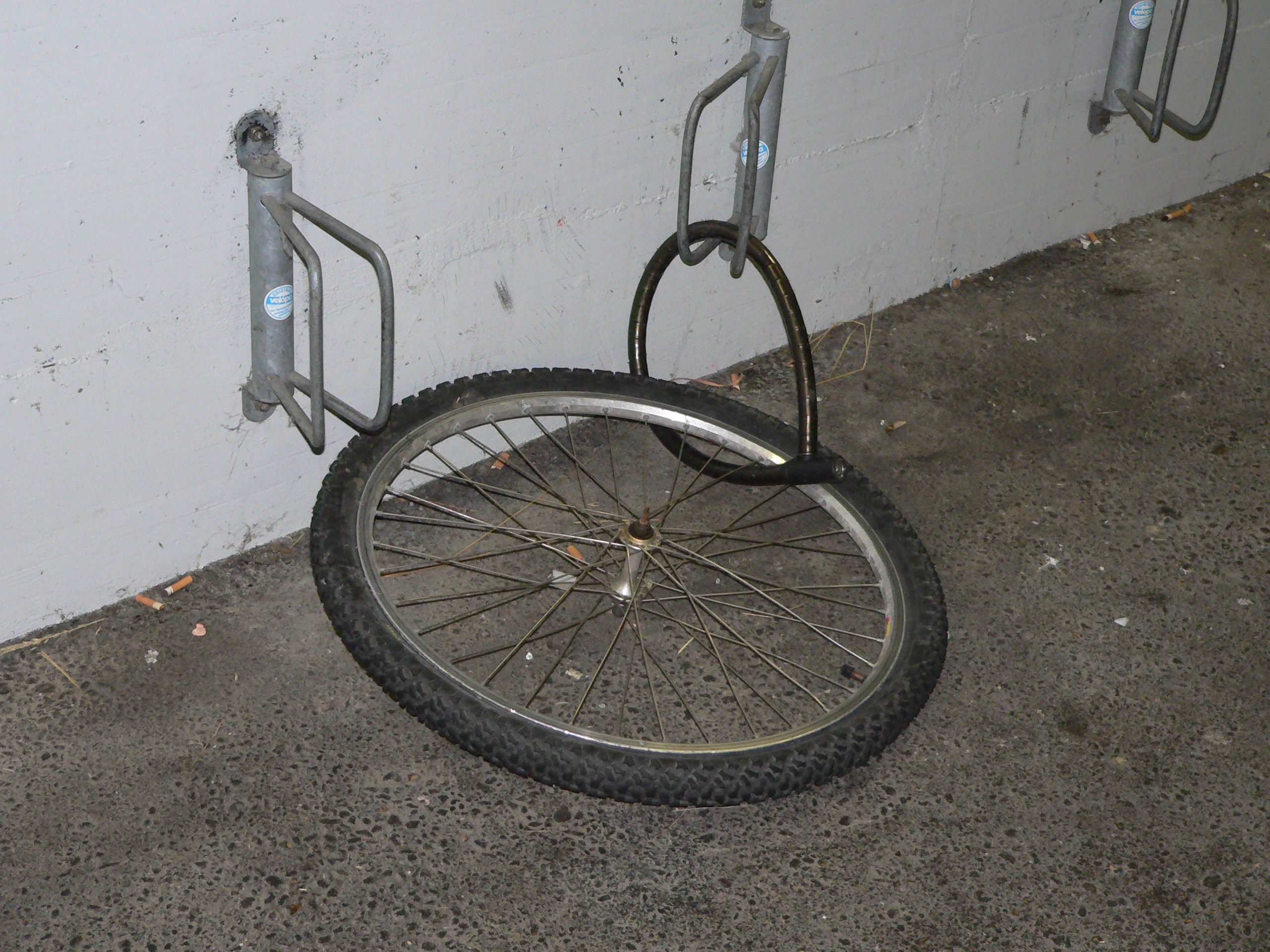 Een achtergebleven voorwiel na diefstal van de rest van de fiets.